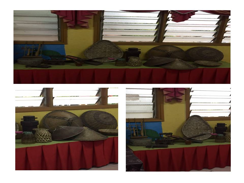 Galeri warisan